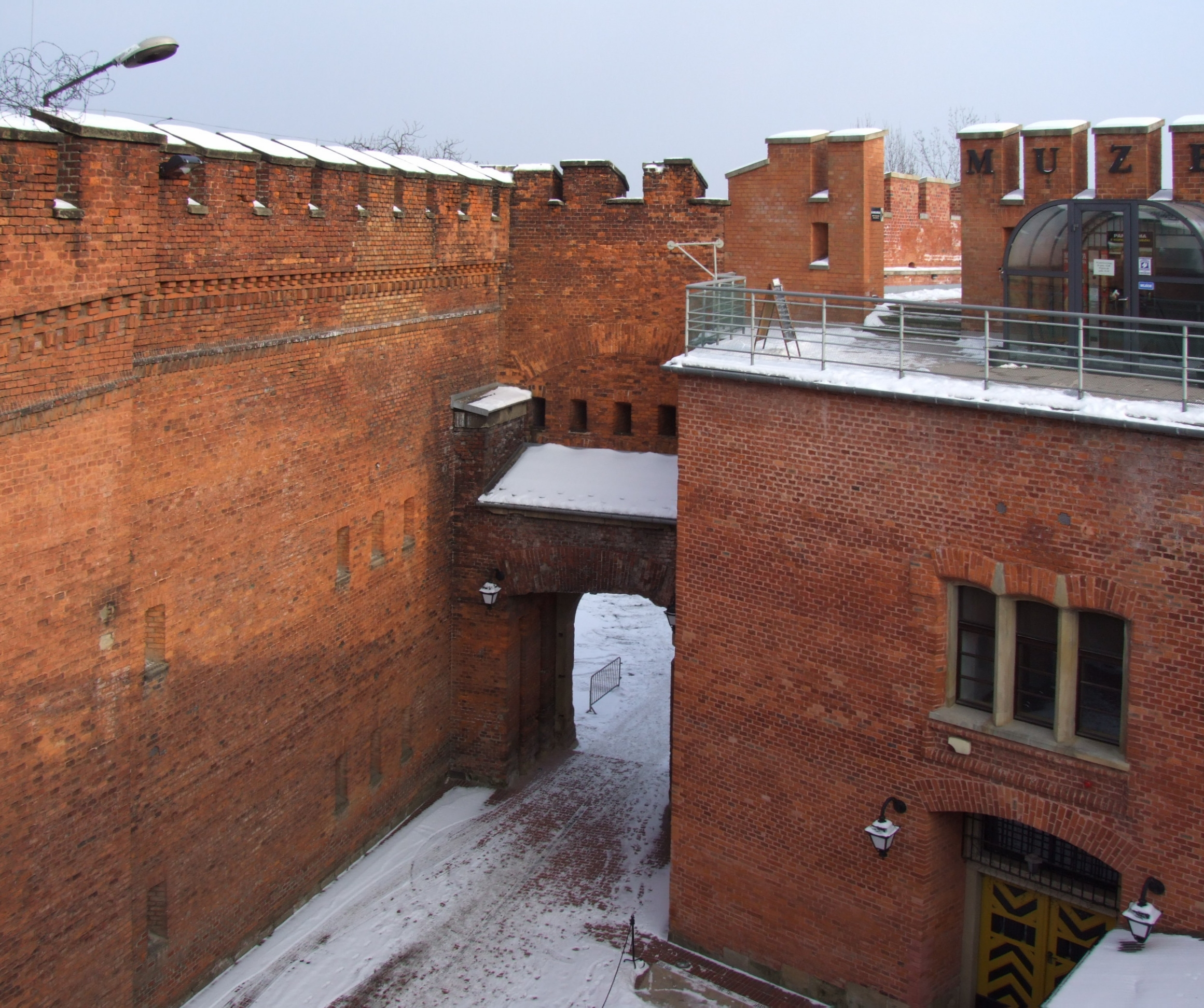 Festung Krakau - Fort 2 Kosciuszko